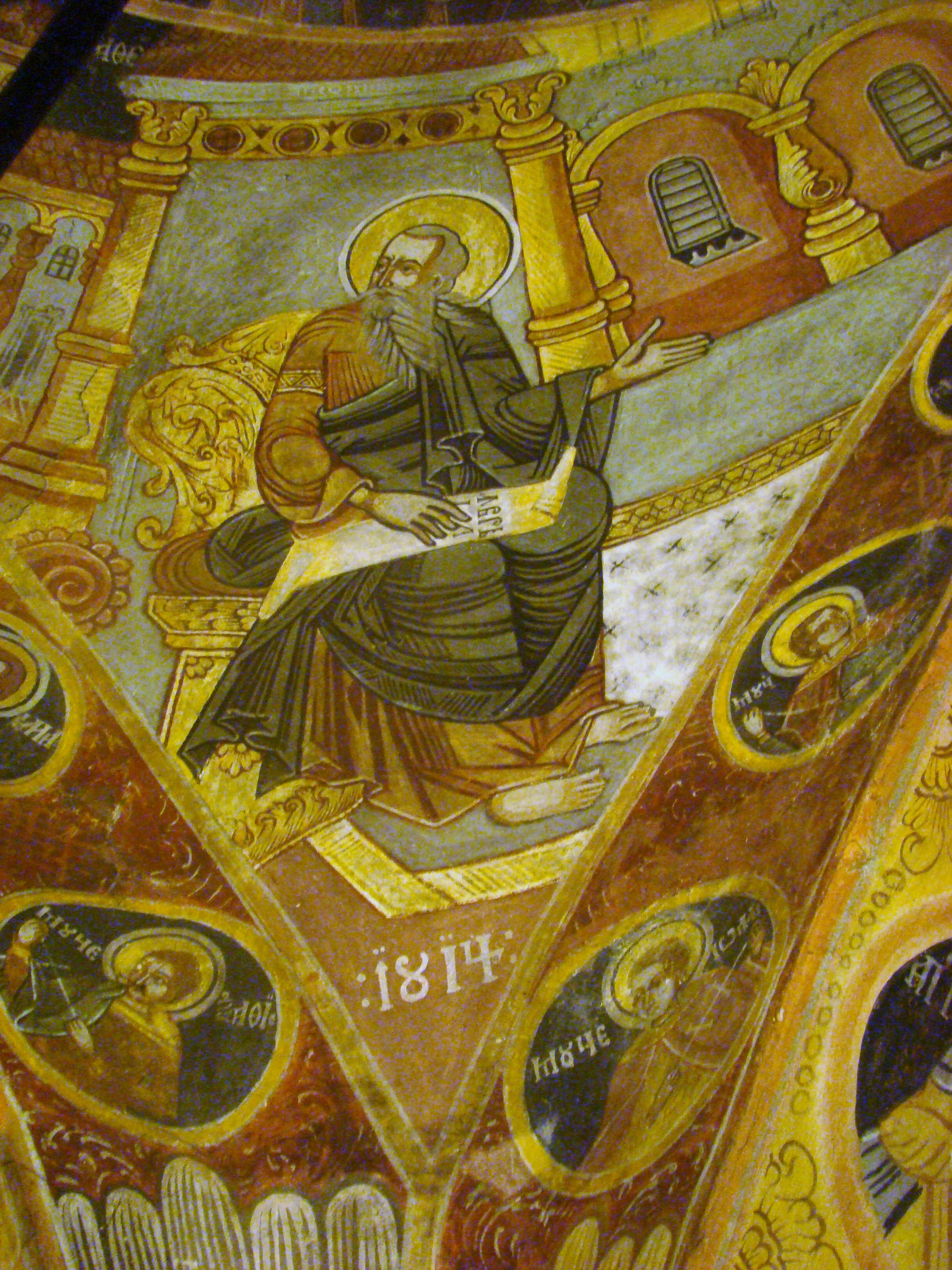 Biserica „Sfântul Vasile cel Mare” din Fofeldea, județul Sibiu